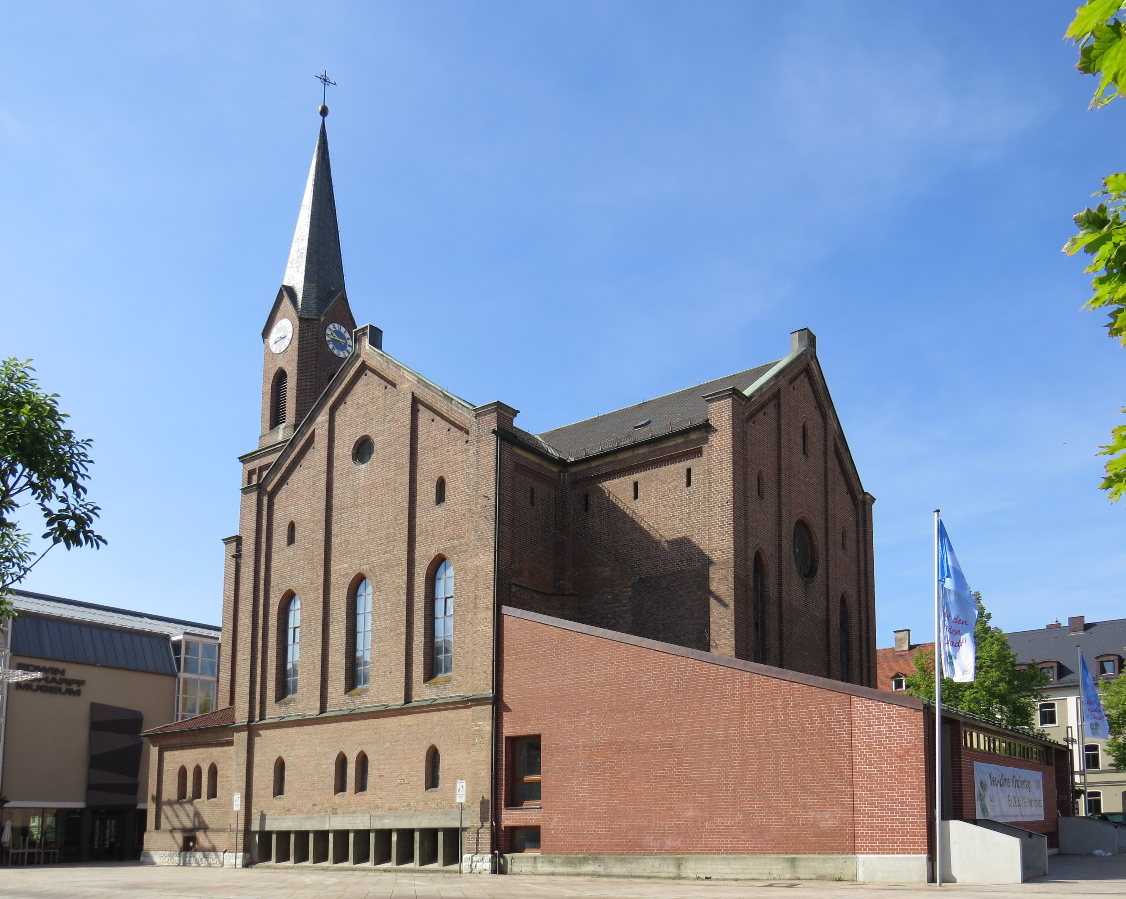 Petruskirche Neu-Ulm